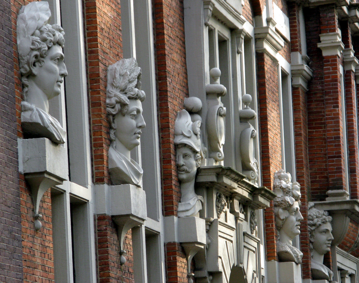 amsterdam, keizersgracht 123